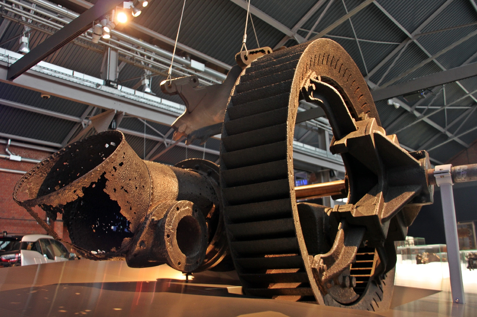 Industriemuseum Chemnitz: Schwamkrug-Turbine. Die von Friedrich Wilhelm Schwamkrug konstruierte Gleichdruckturbine war speziell für den Einsatz im Bergbau und Gefälle von über 100 Meter vorgesehen. Dabei handelt es sich um eine langsam laufende Turbine, die mit ihrem Arbeitstempo an die langsam arbeitenden Kolbenpumpen-Kunstgezeuge angepasst war. Schwamkrug konstruierte folglich eine Turbine mit großem Umfang, die nur mit einer kleinen Menge Aufschlagwasser arbeitete, wobei diese Wassermenge auch nur partiell auf die Beschaufelung traf.